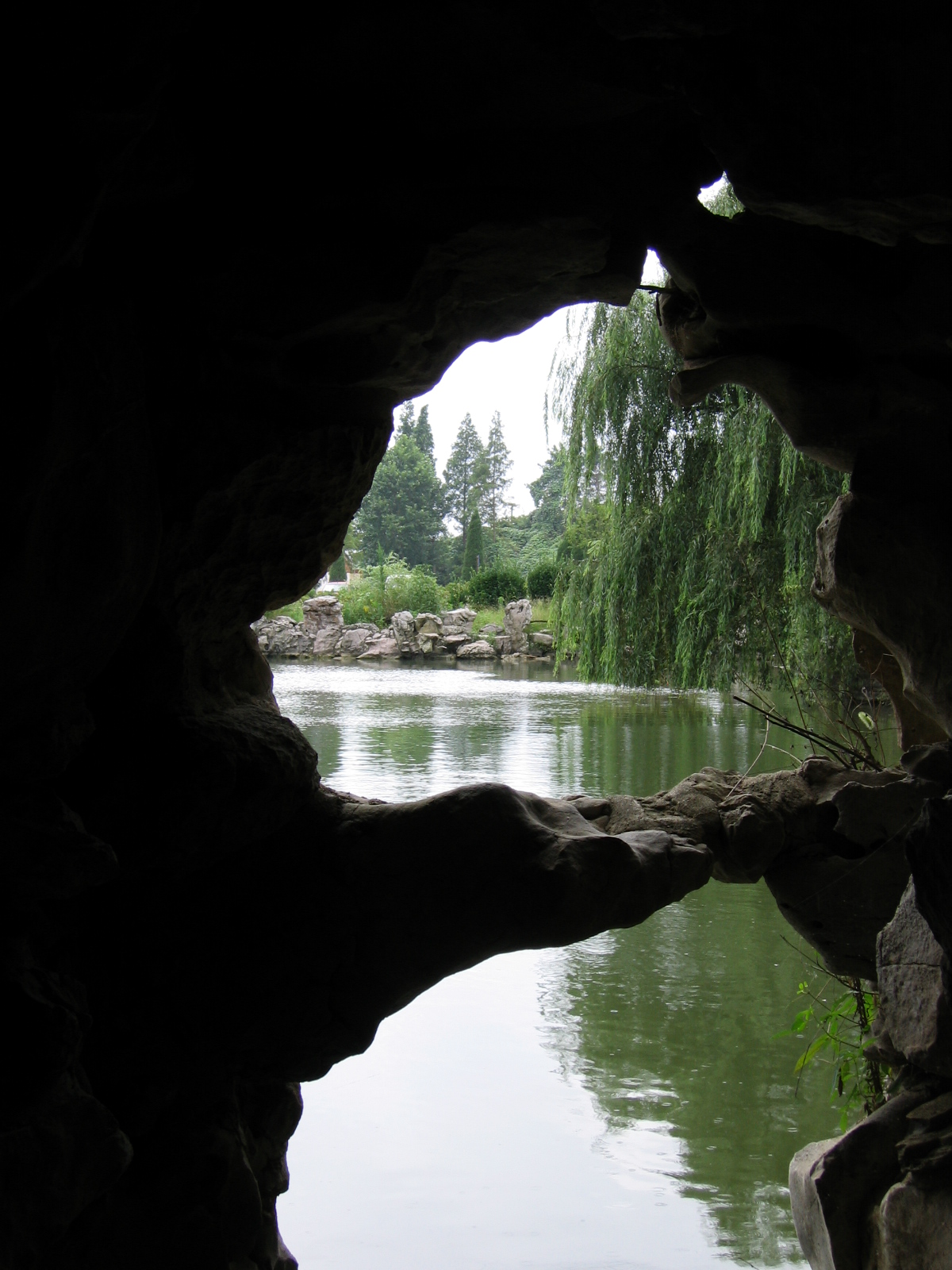 广德太极洞外景 Taiji Cave, Anhui, China